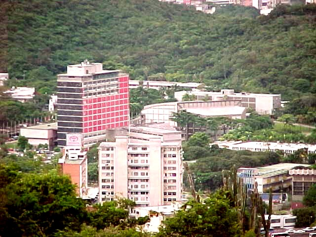 Universidad Central de Venezuela en el municipio Libertador, Distrito Capital - Venezuela (2000)